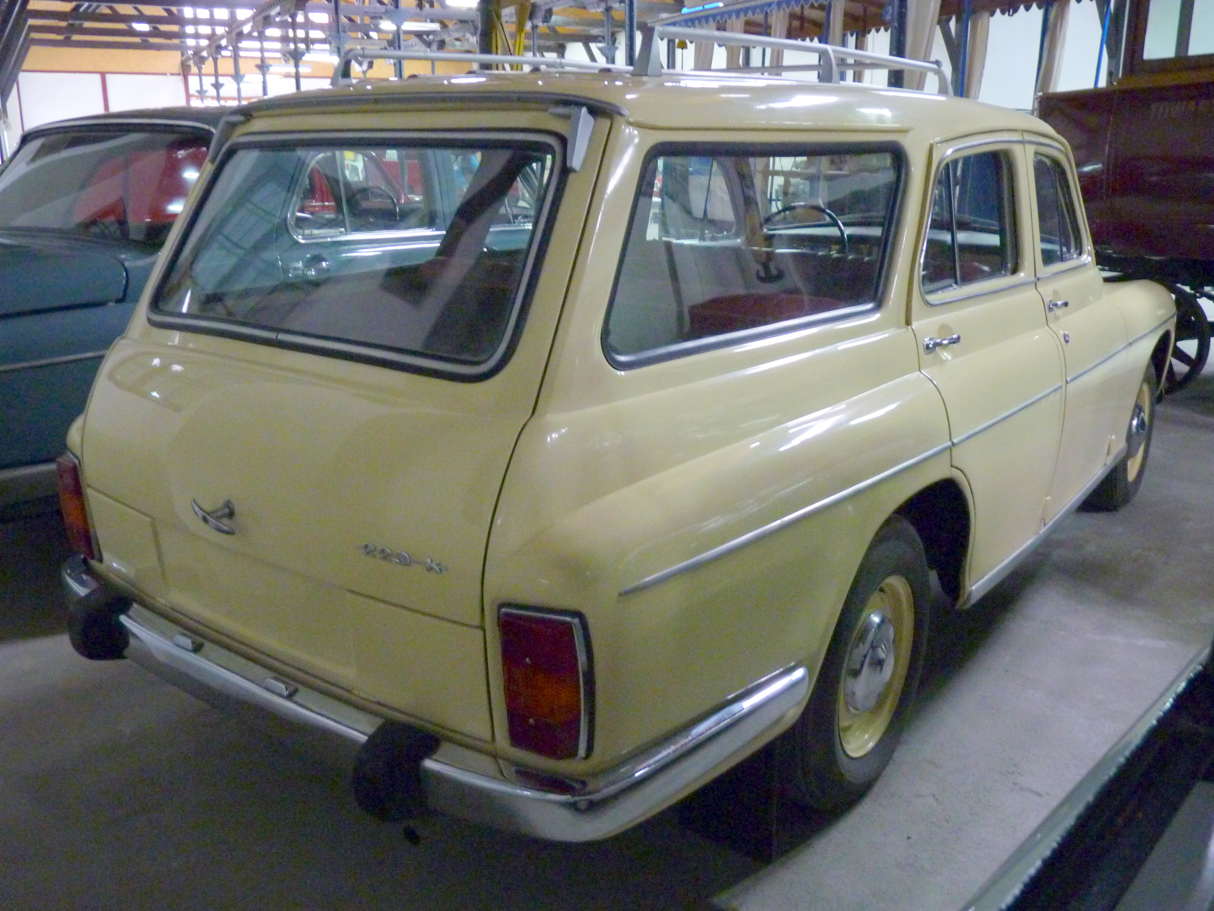 FSO Warszawa 223 K at Muzeum Inżynierii Miejskiej in Kraków.